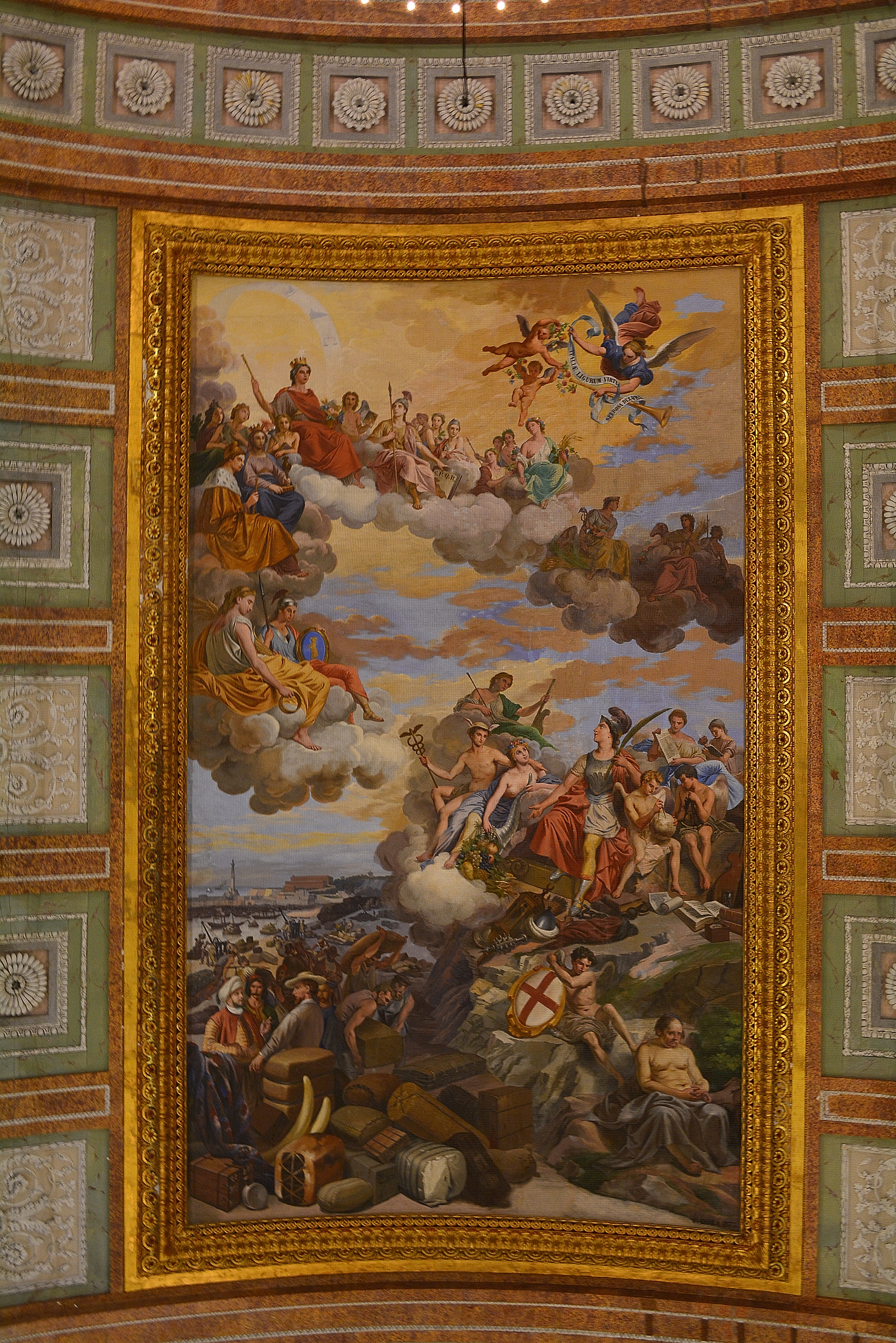 Palazzo Ducale di Genova This is a photo of a monument which is part of cultural heritage of Italy.